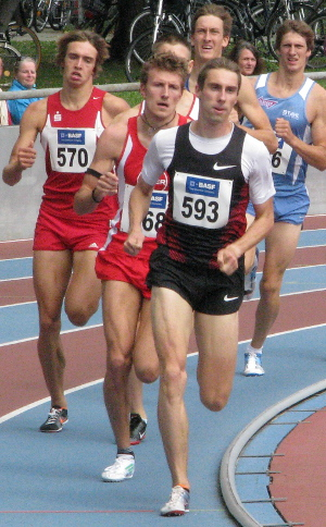 800-m-Lauf beim DLV WM-Testwettkampf 2011 im Stadion der MTG Mannheim. V.l.n.r.: Ronny Heck, Robin Schembera, Patrick Oehler, Sebastian Keiner, Alexander Schwab.